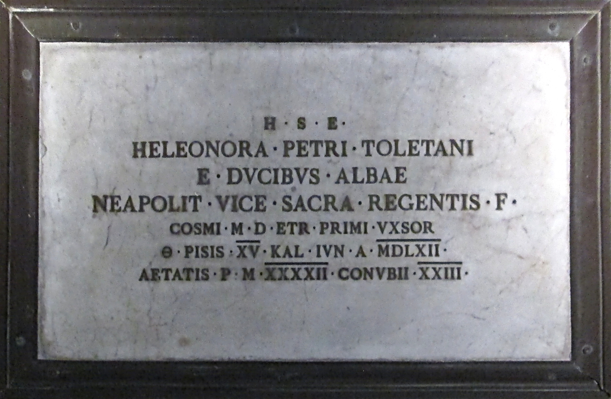 Cappelle medicee della basilica di San Lorenzo a Firenze. Prima cappella di destra. Lastra tombale di Eleonora di Toledo, duchessa di Firenze e di Siena, prima moglie del granduca Cosimo I de' Medici